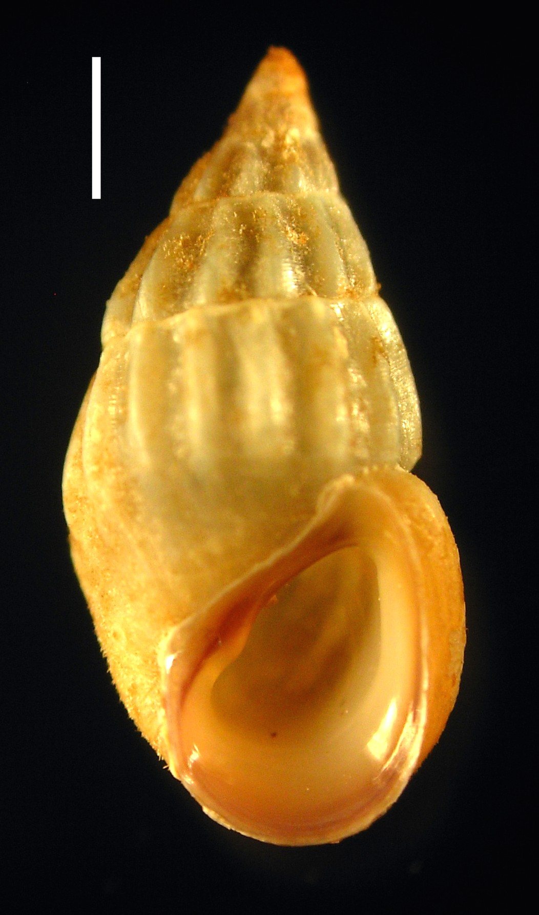 Rissoa membranacea. Coquille et ouverture.